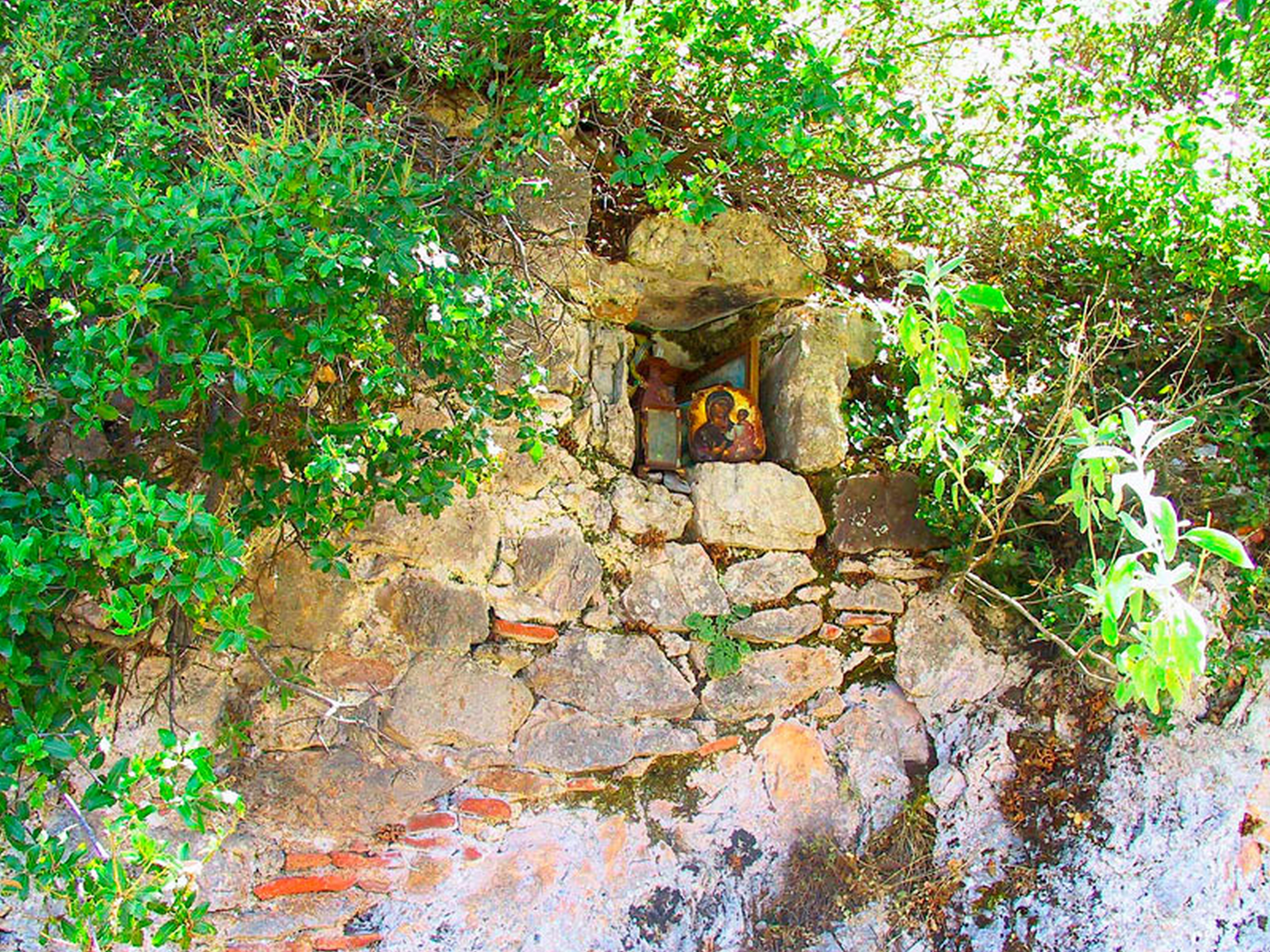 Κάστρο Μπεζενίκου